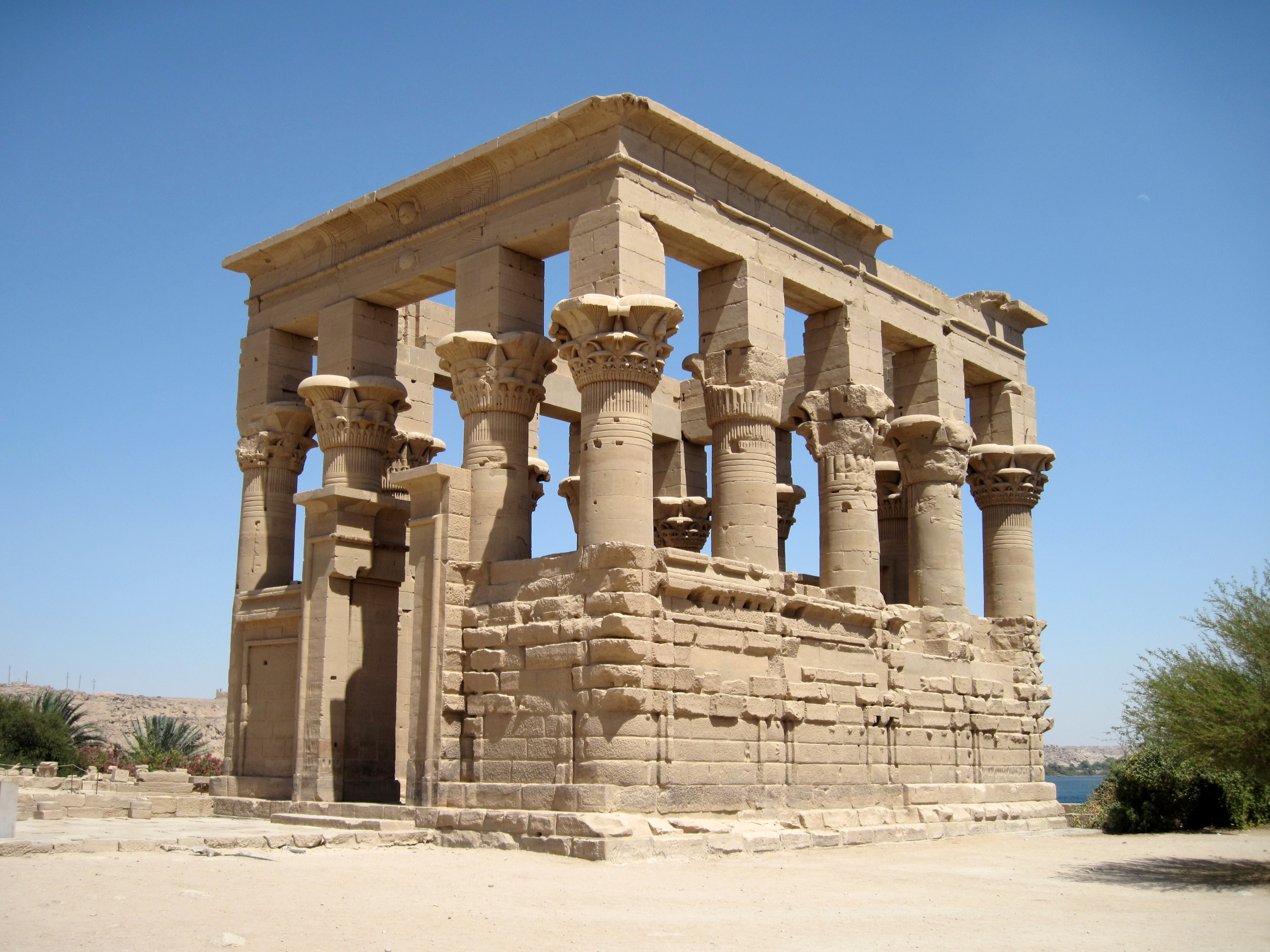 Kiosk des Trajan vor dem Isis-Tempel von Philae auf der Insel Agilkia, Ägypten